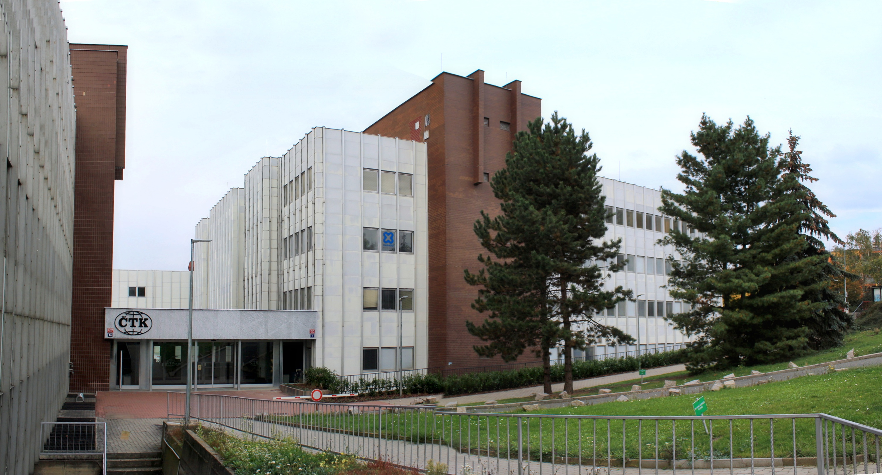 Budova ČTK Praha-Strašnice